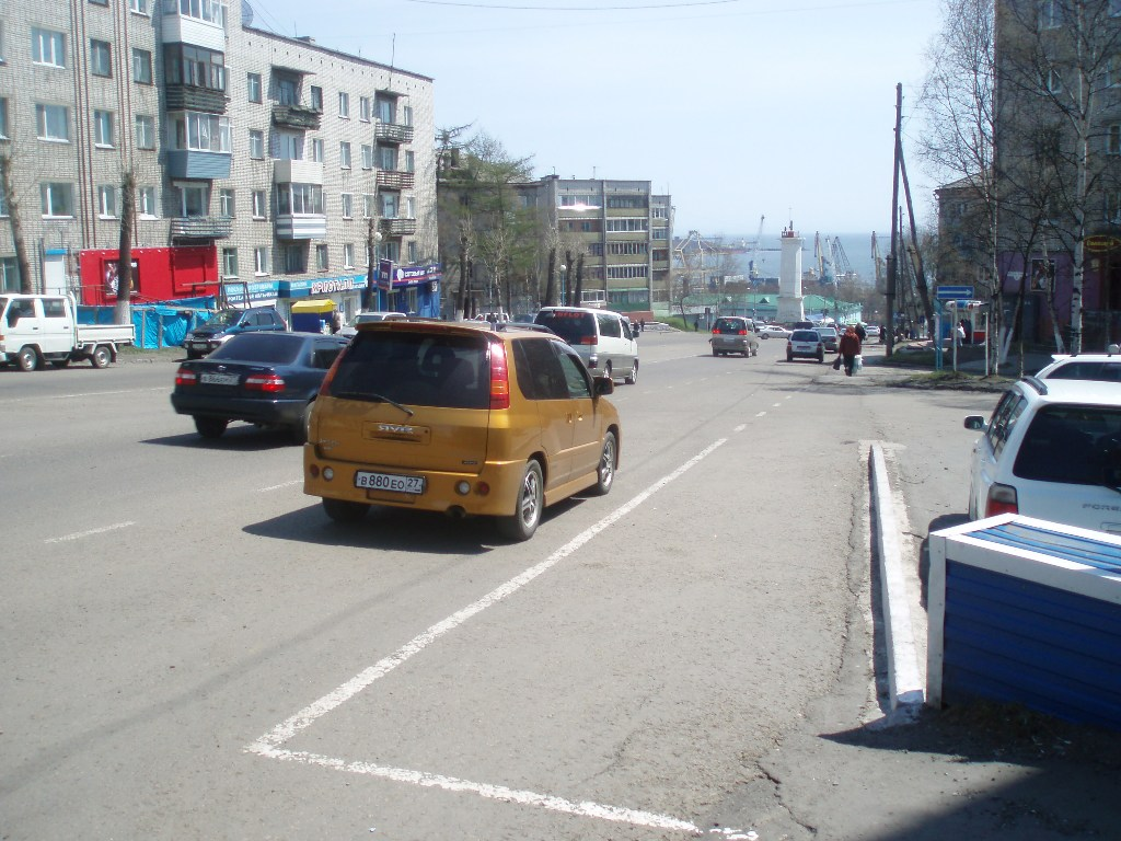 Ванино - Приморский бульвар (сверху вниз)